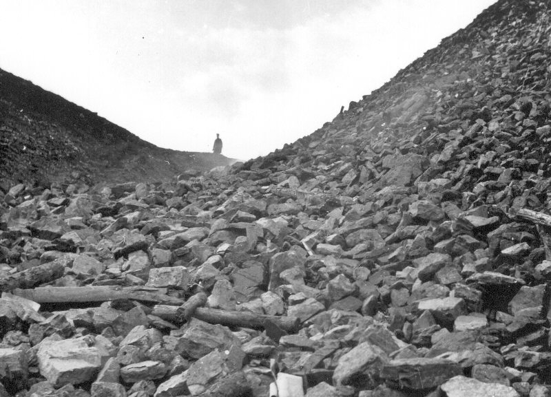 Kadr z filmu "Wzgórze Marsa", reż. Antoni Halor